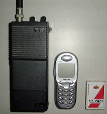 Handys verschiedener Generationen: Amateurfunkhandy von 1981 (links), Telefonhandy von 2001 Links ein Amateurfunk-Handsprechfunkgerät, Icom IC2e (ca. 1981, FM, Wellenlänge 2 m). Mitte ein Telefonnetzhandy Siemens S45i (ca. 2001, GSM, Wellenlänge ca. 35 cm und 15 cm). Rechts eine Streichholzschachtel zum Größenvergleich.